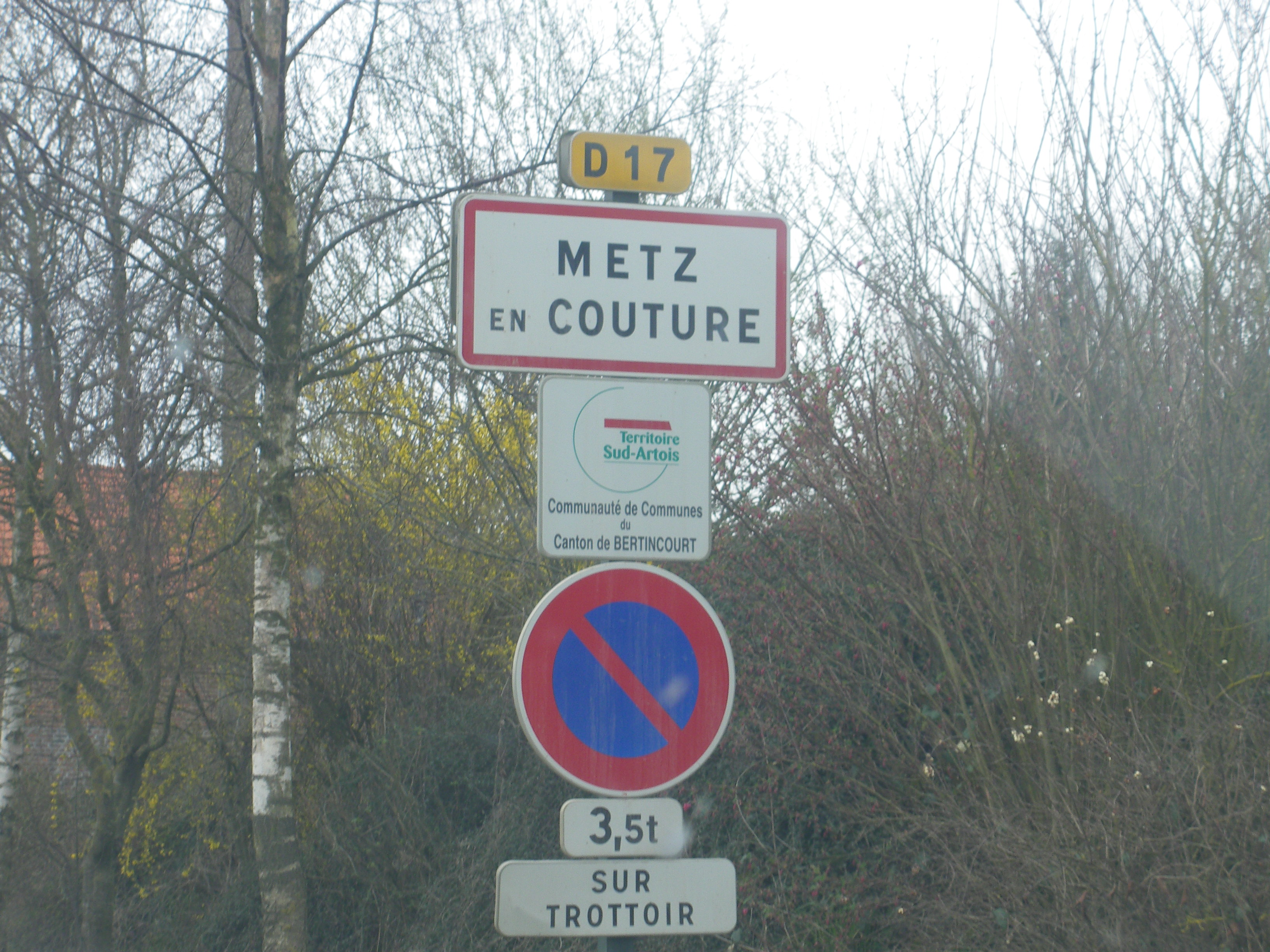 Panneau d'entrée de la commune de Metz-en-Couture.